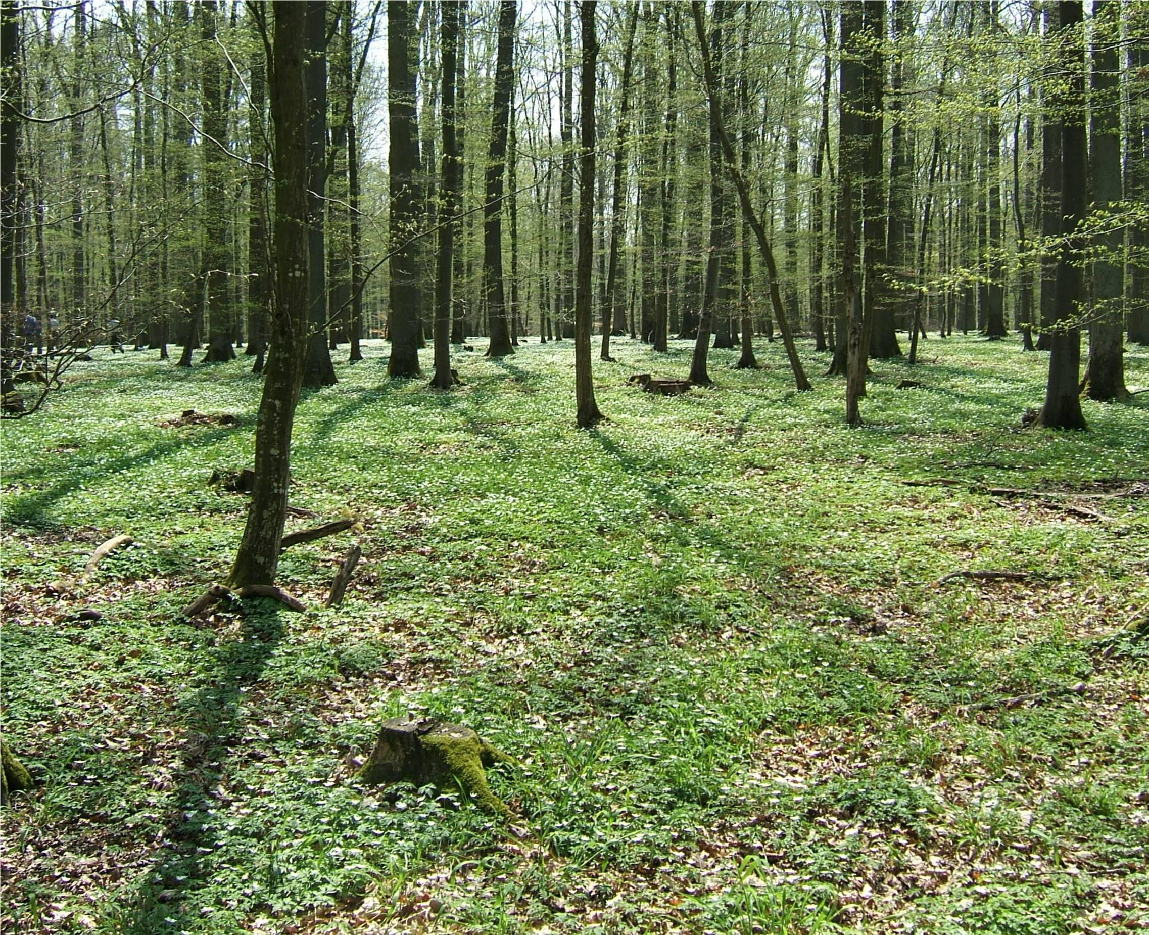 FFH-Lebensraumtyp 9130 Waldmeister-Buchenwald (Asperulo-Fagetum) im Frühling